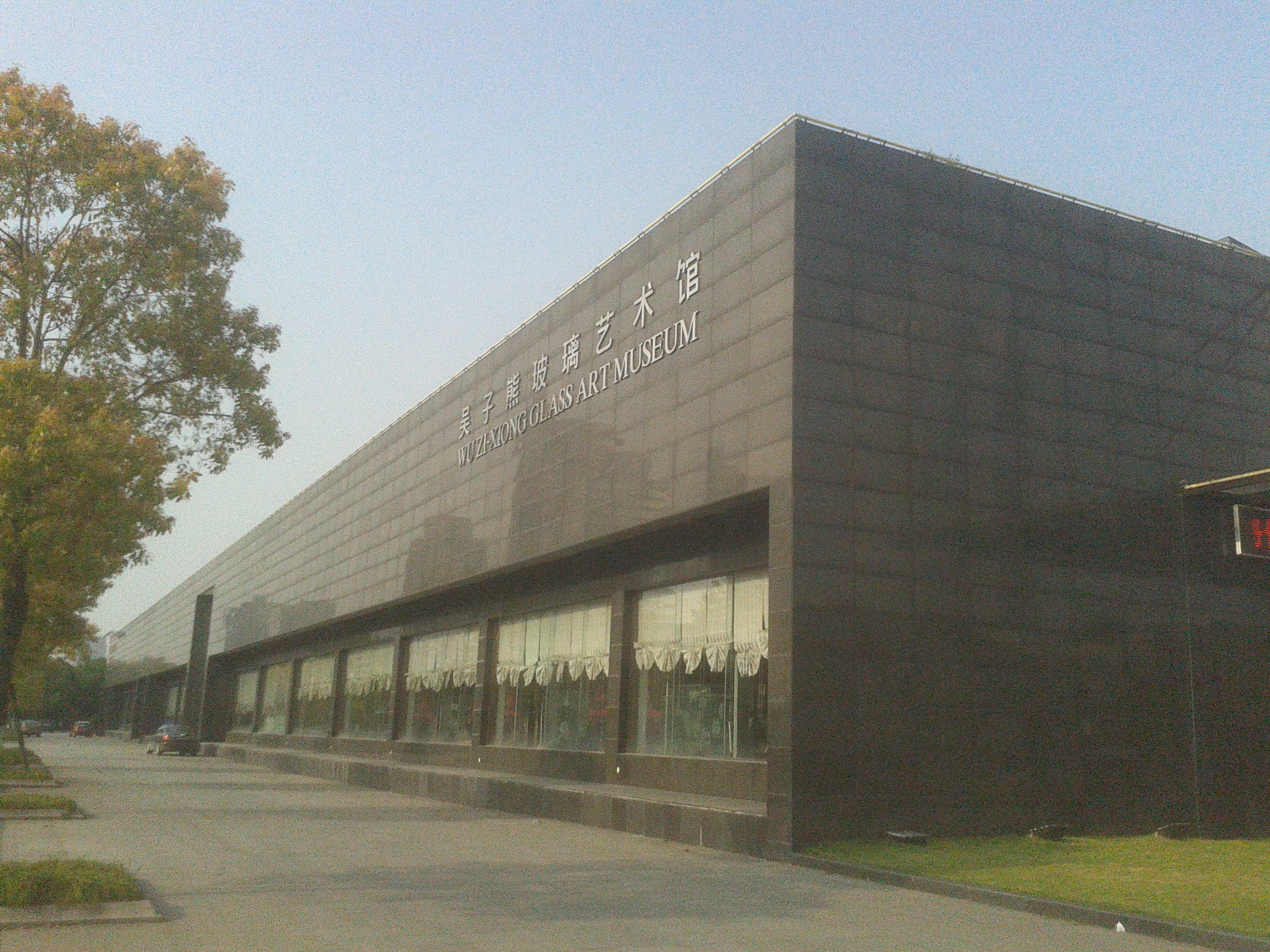 浙江台州吴子熊玻璃艺术馆